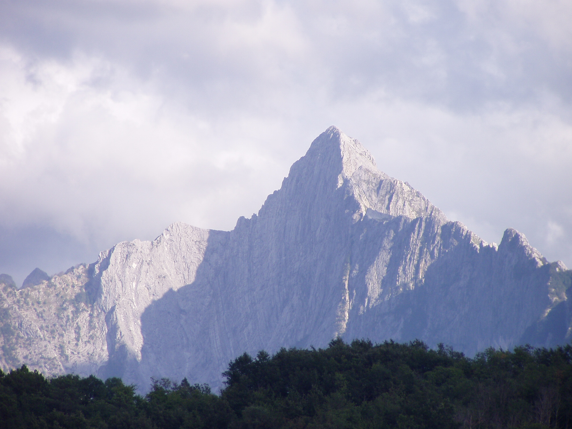 Pizzo d'Uccello (NORD)